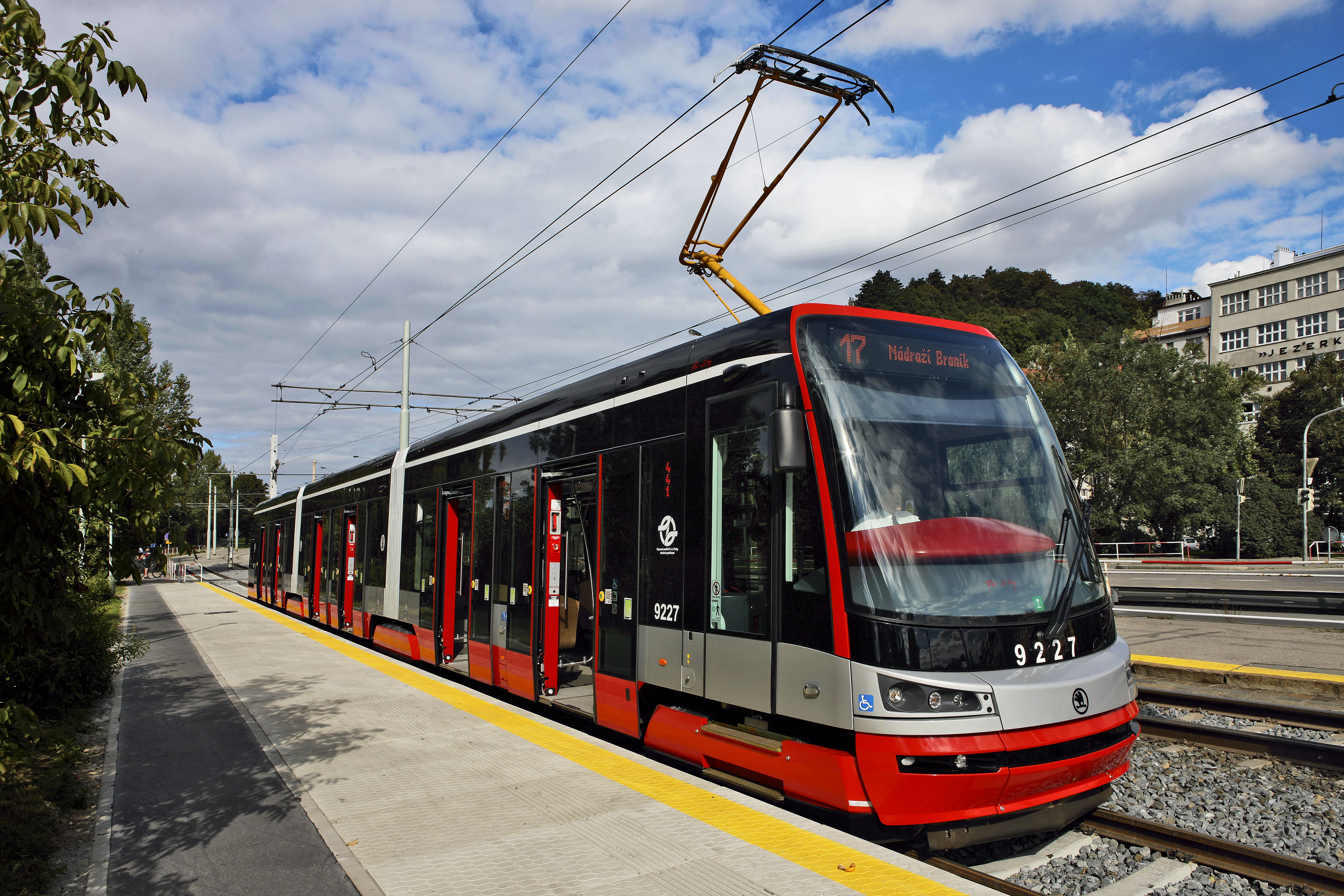 Tramvaj "ForCity" v plném provozu